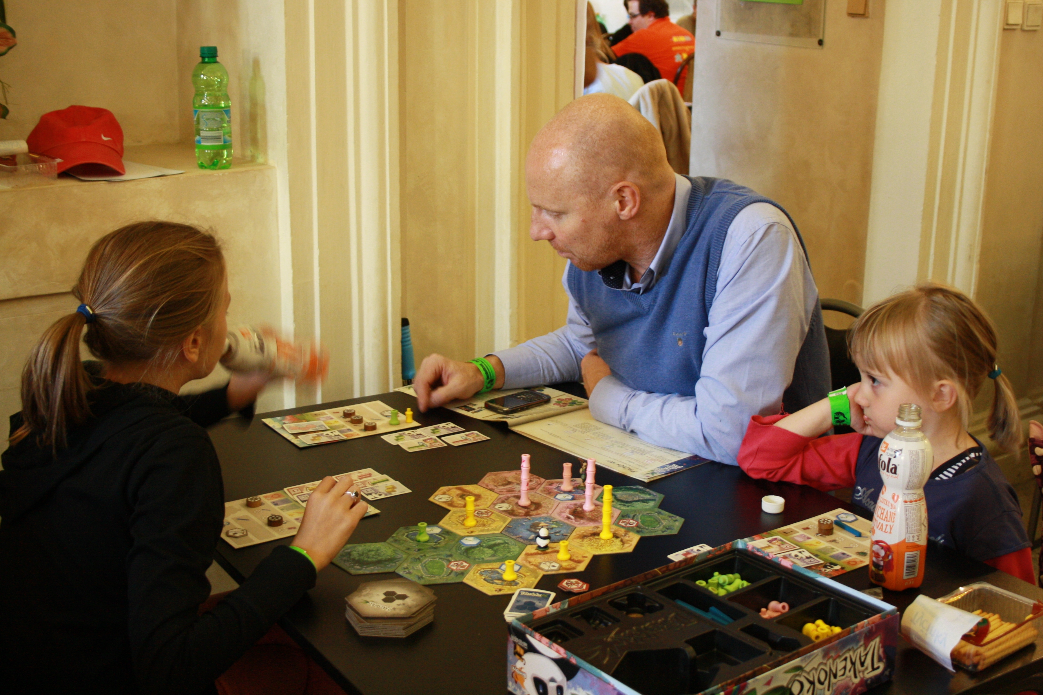 Deskohraní 2012 - Takenoko